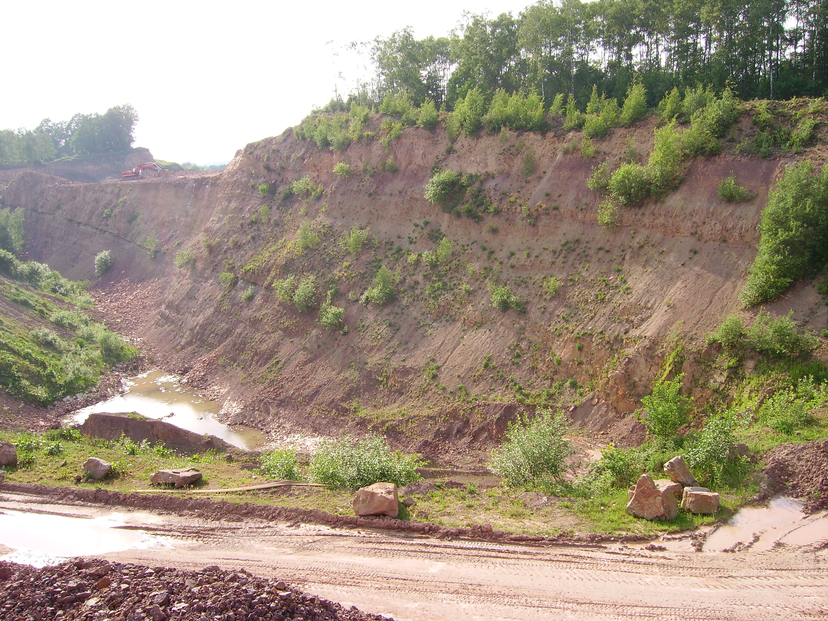 Steinbruch am Kälberberg in Recke-Obersteinbeck, Kreis Steinfurt, Nordrhein-Westfalen, Deutschland.